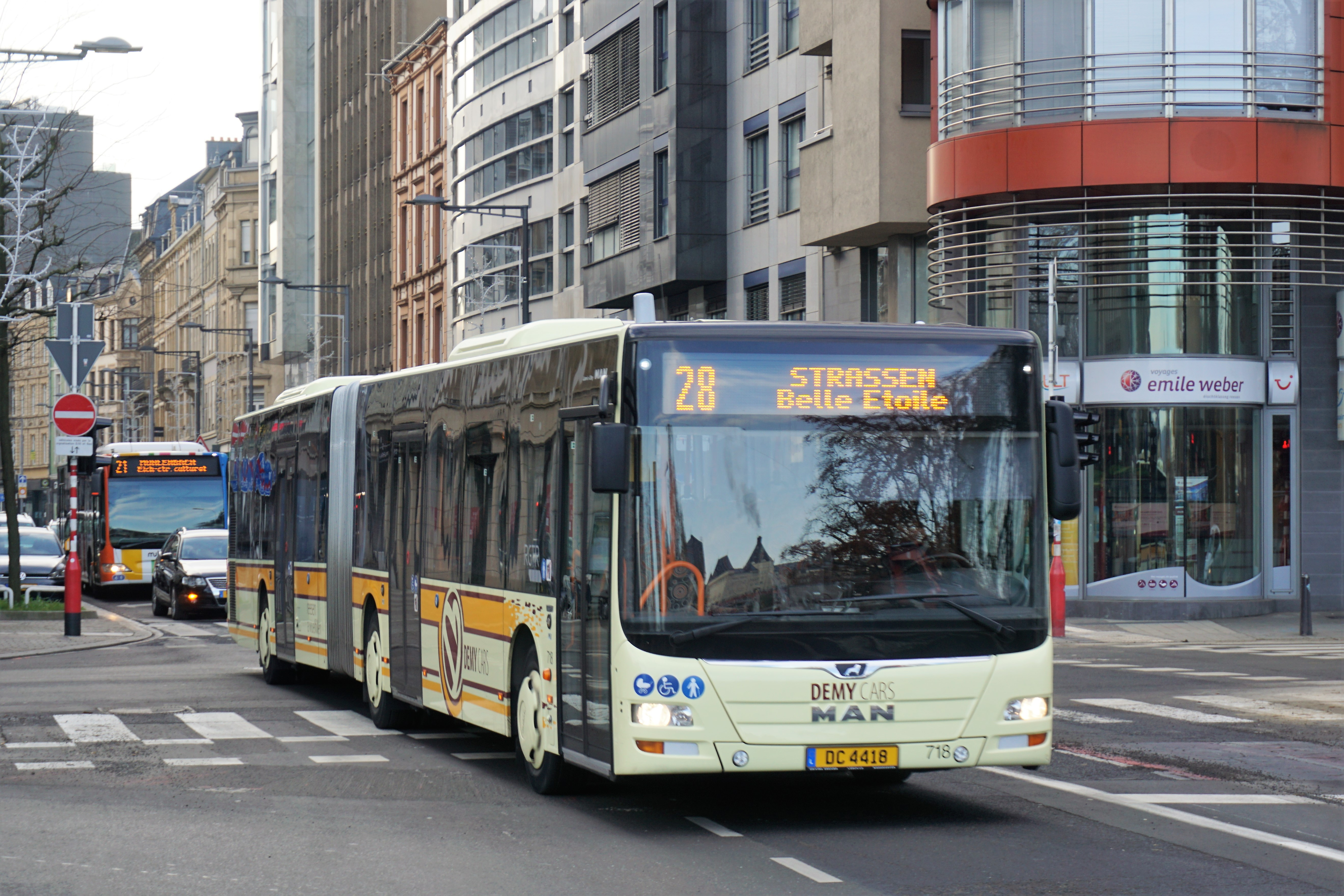 Luxembourg, bus "Demy Cars" (#DC4418) sur une ligne 28 dans l'avenue de la Gare en direction de Strassen.